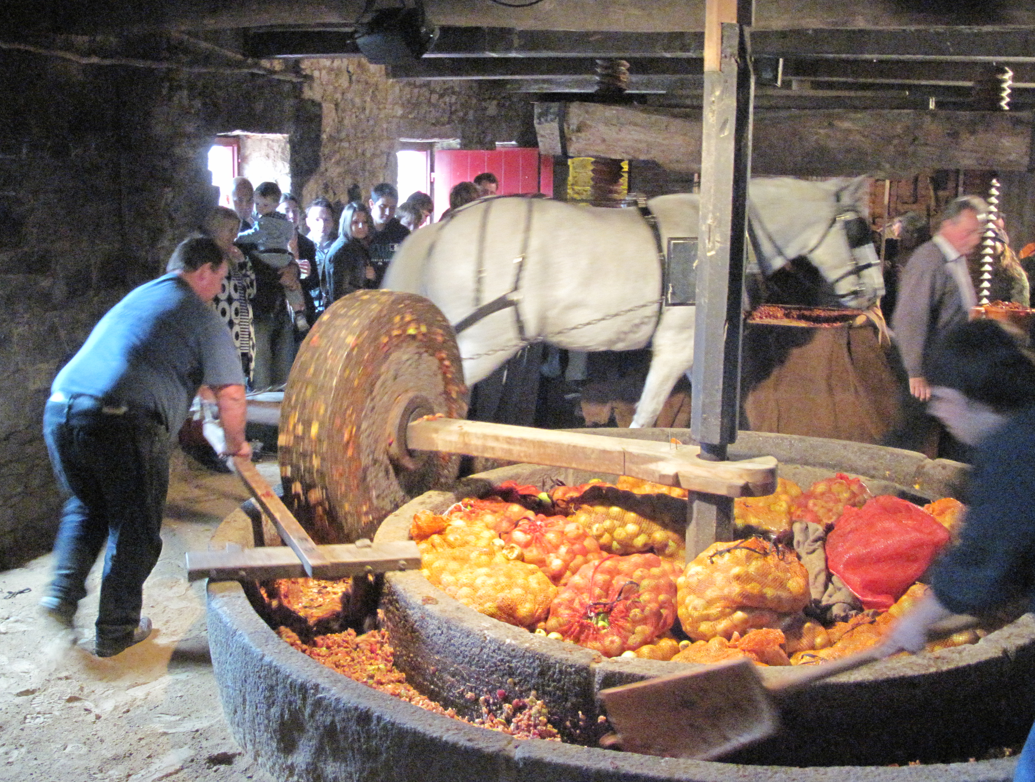 Nrf: Faîs'sie d'Cidre, 17-18 d'Octobre 2009, Jèrri